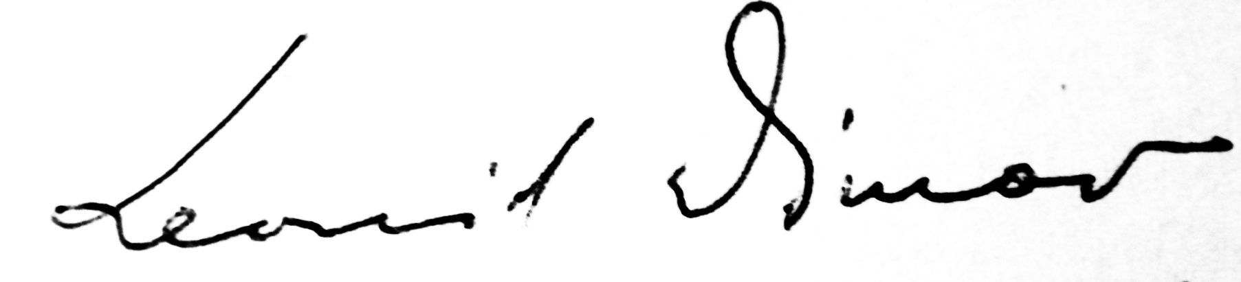 Semnatura lui Leonid Dimov